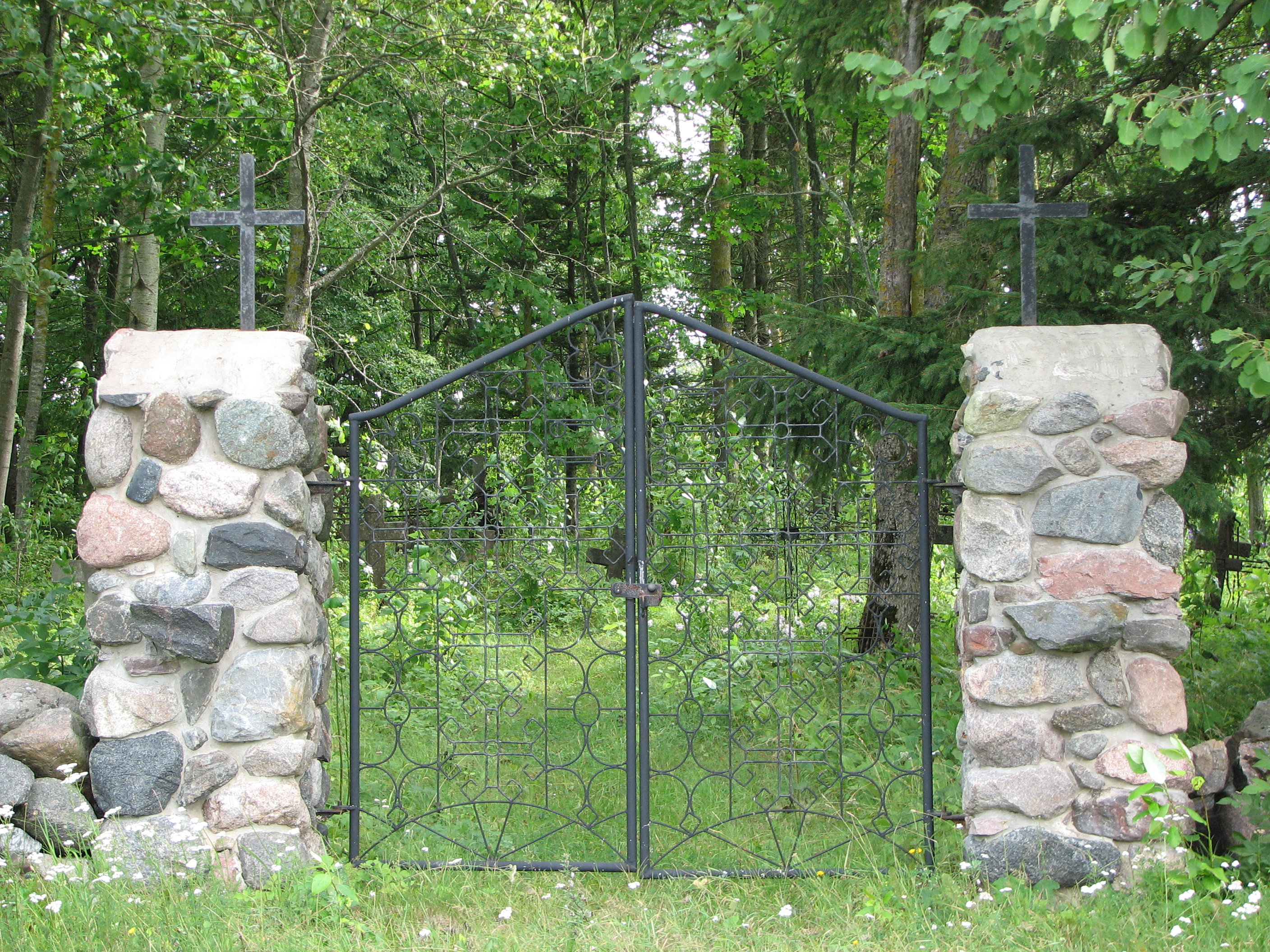 Hosby vana kalmistu värav Noarootsi vallas